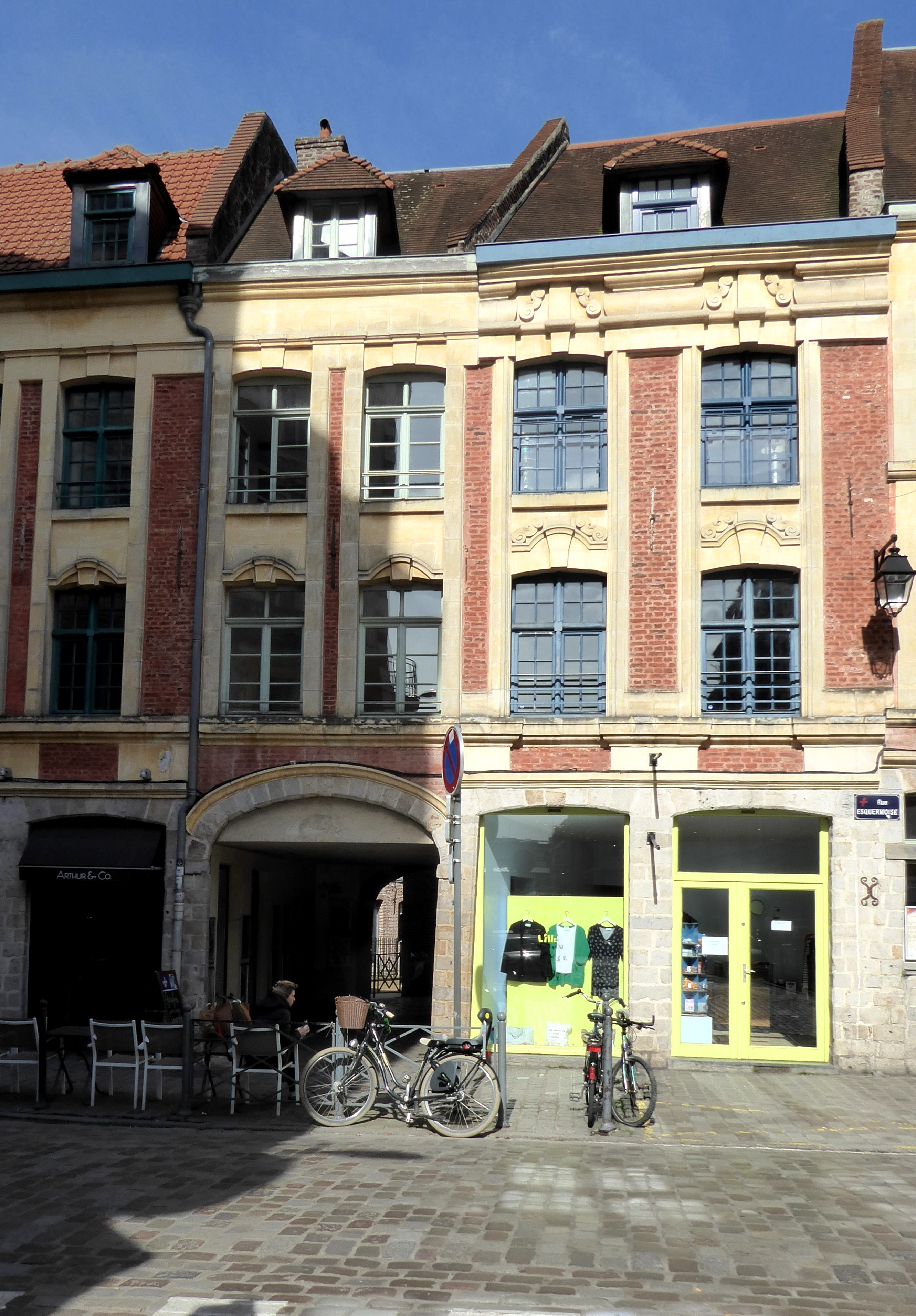 Rue Esquermoise entrée ancien canal du pont de Weppes